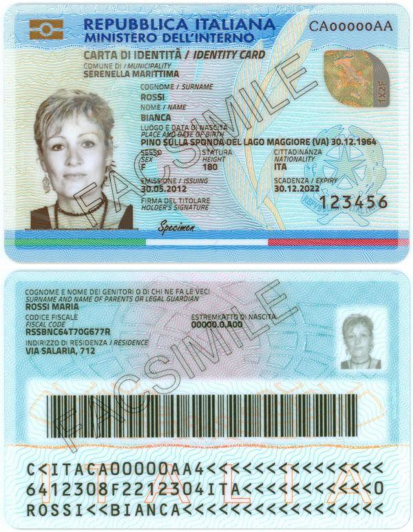 Fac-simile del fronte-retro della nuova Carta d'identità elettronica (CIE) introdotta a partire dal 2016